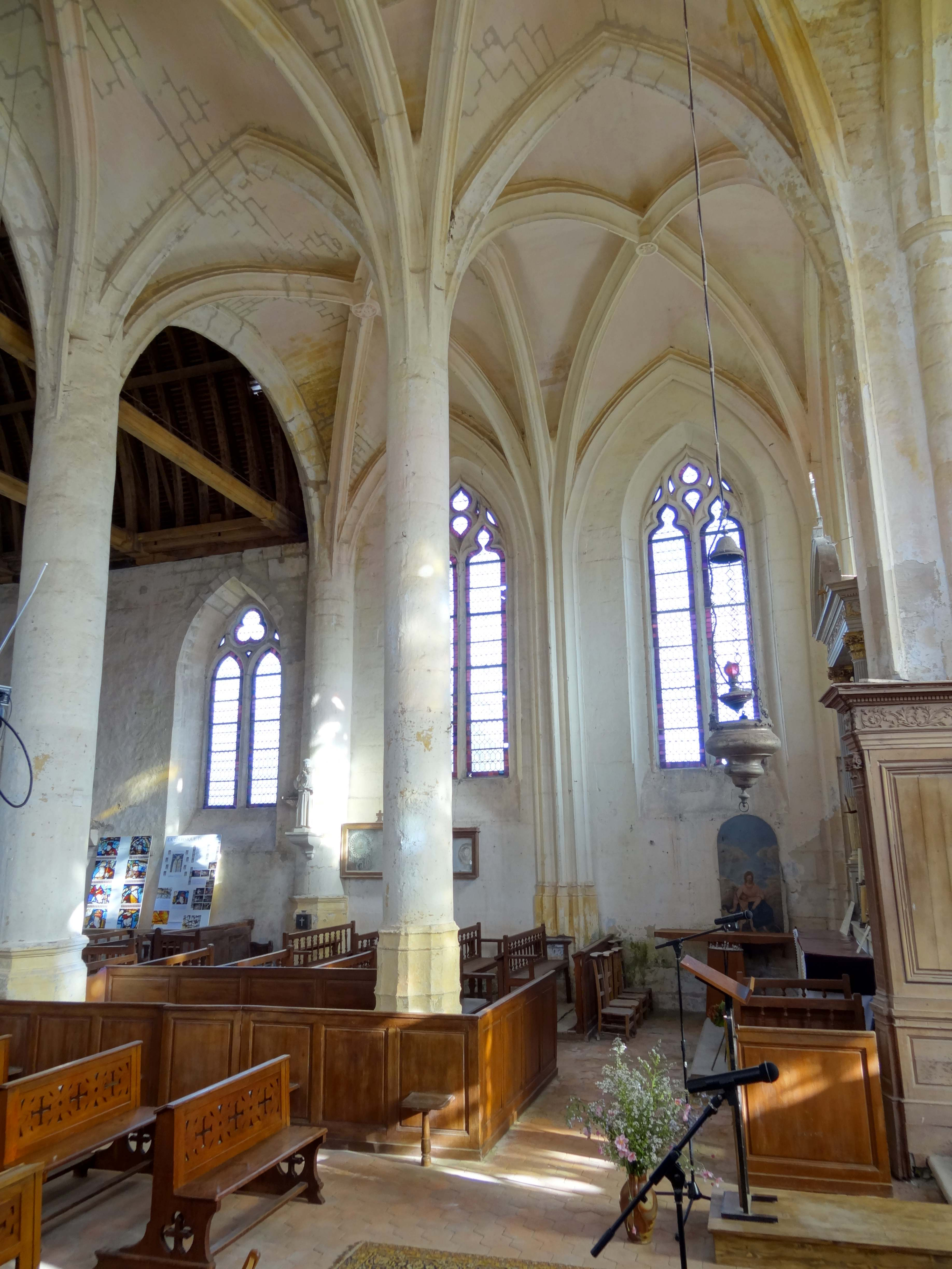 Intérieur de l'église - voir titre.